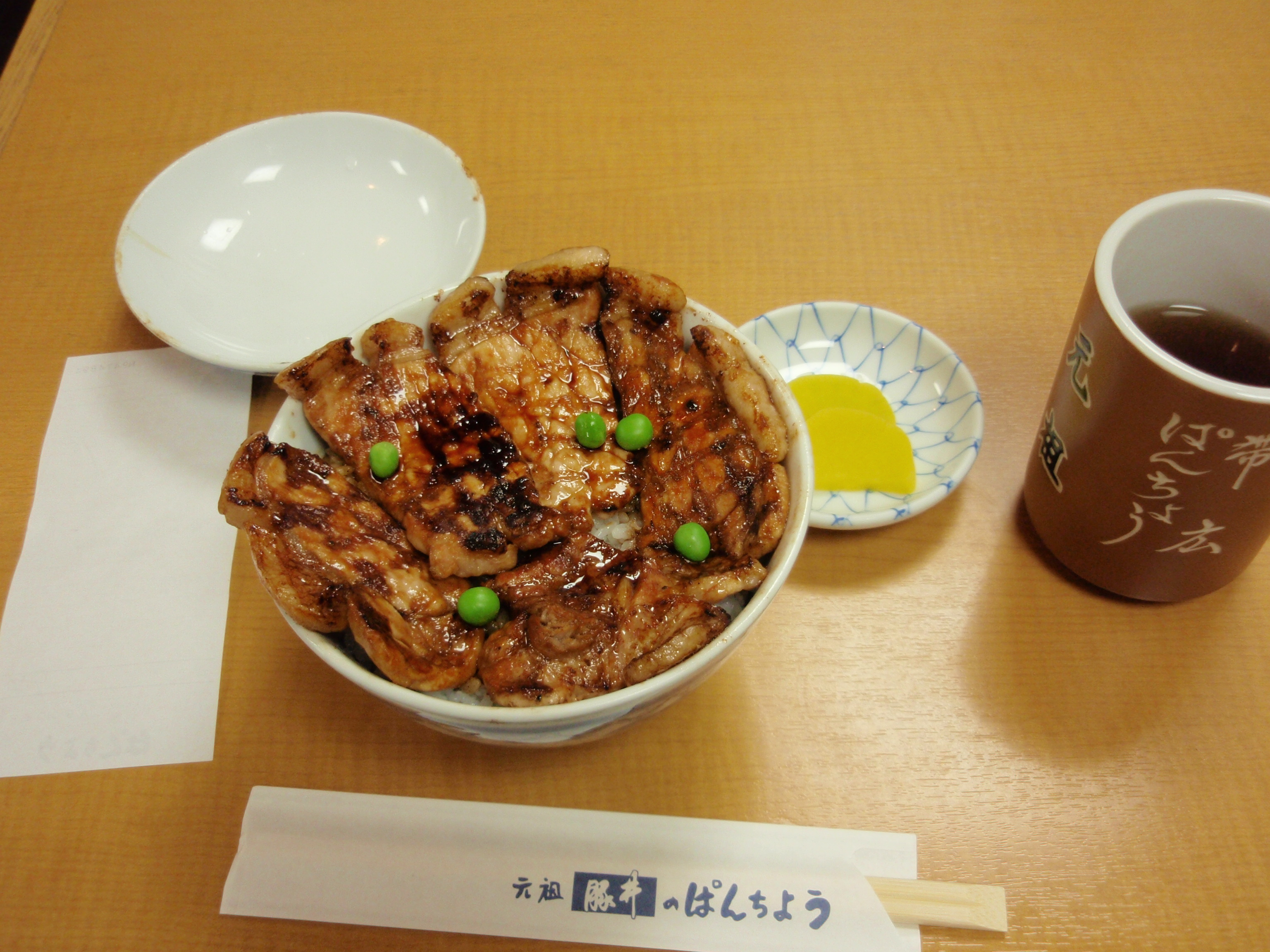 ぱんちょうの豚丼